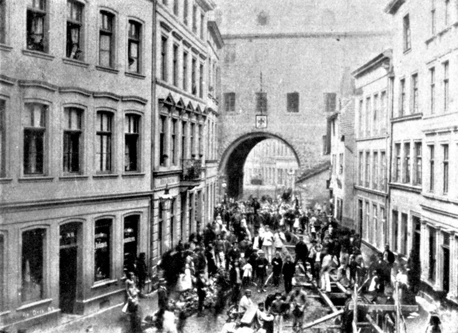 Weyerstraße und Weyertor am 01. Oktober 1883 beim Bau des ersten Kanals